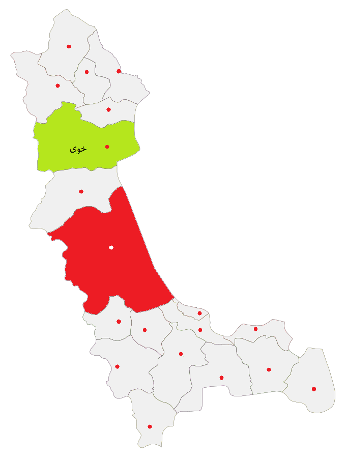 شهرستان خوی